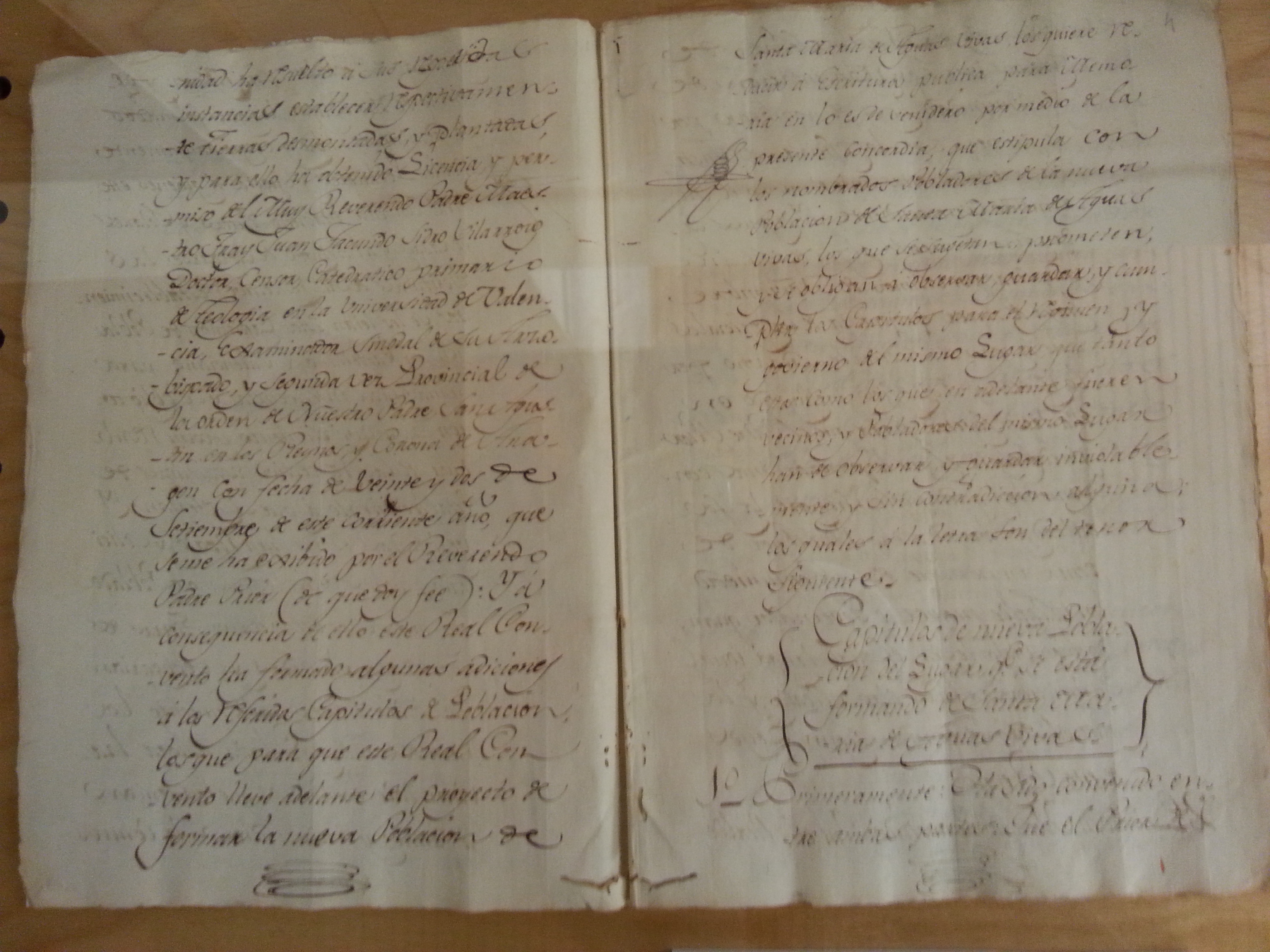 Concòrdia signada entre el convent d'Aigues Vives i els pobladors de Santa Maria d'Aigues Vives, en terme de Carcaixent, per a reforamr alguns capítols de la carta pobla de 1787, amb la finalitat d'establir noves terres i que el convent puga obtenir la jurisdicó alfonsina (12 de desembre de 1796). ARV: Clero, Caixa 1009/1. Arxiu del Regne de València.